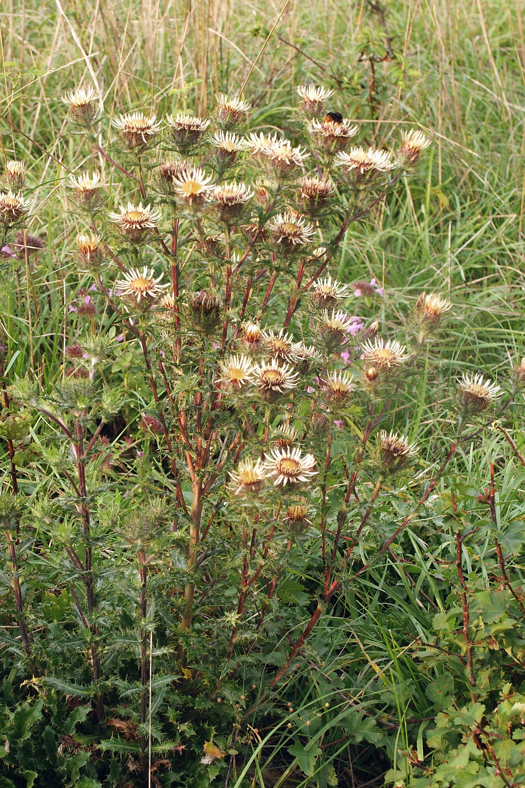 Carlina vulgaris, northern Baden-Württemberg, Germany